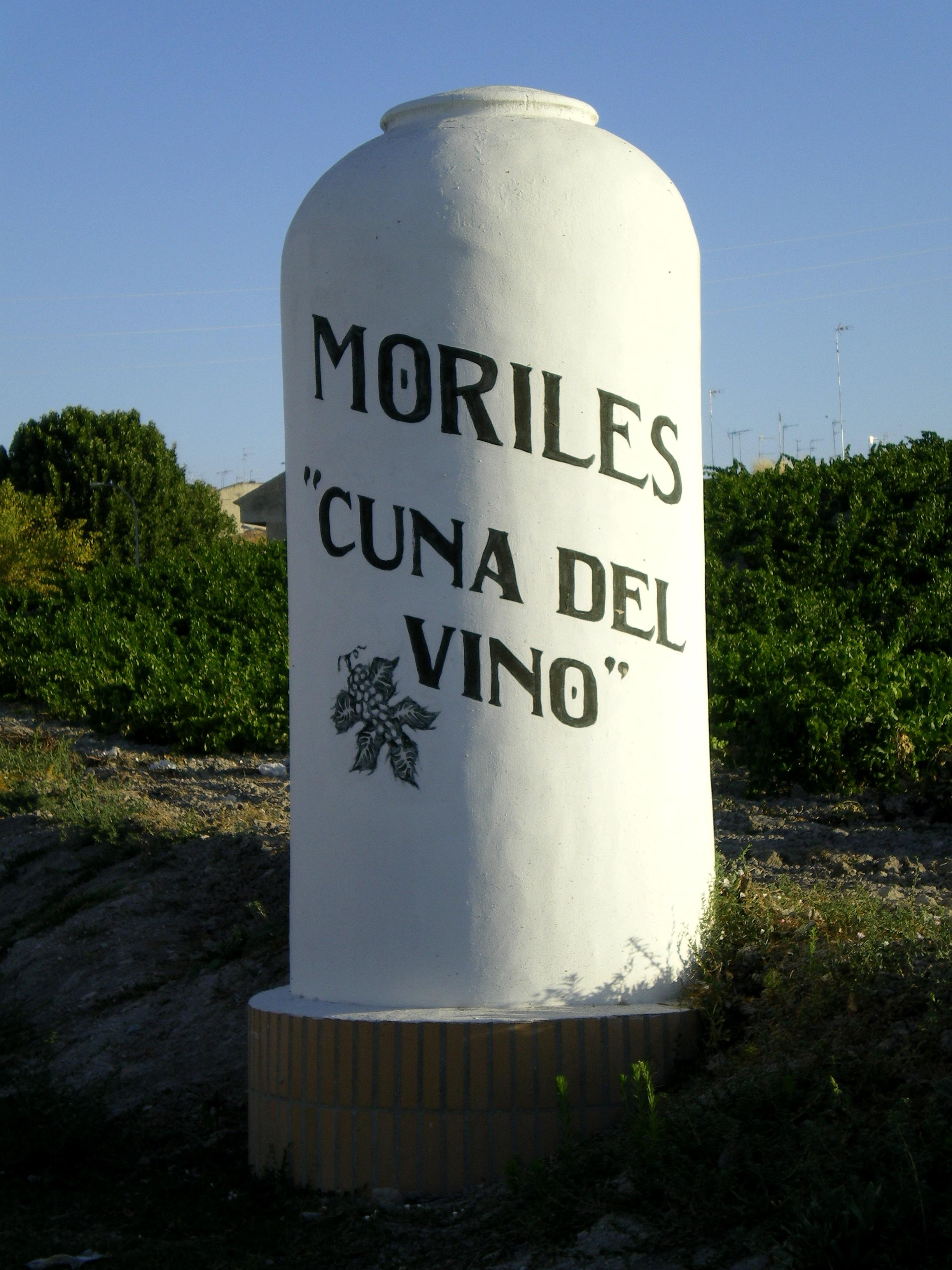 Aragonés: Cono (tina gran ta la primera fermentacion d'o vin) que ye estato recuperato ta decoracion en Moriles, Cordoba.